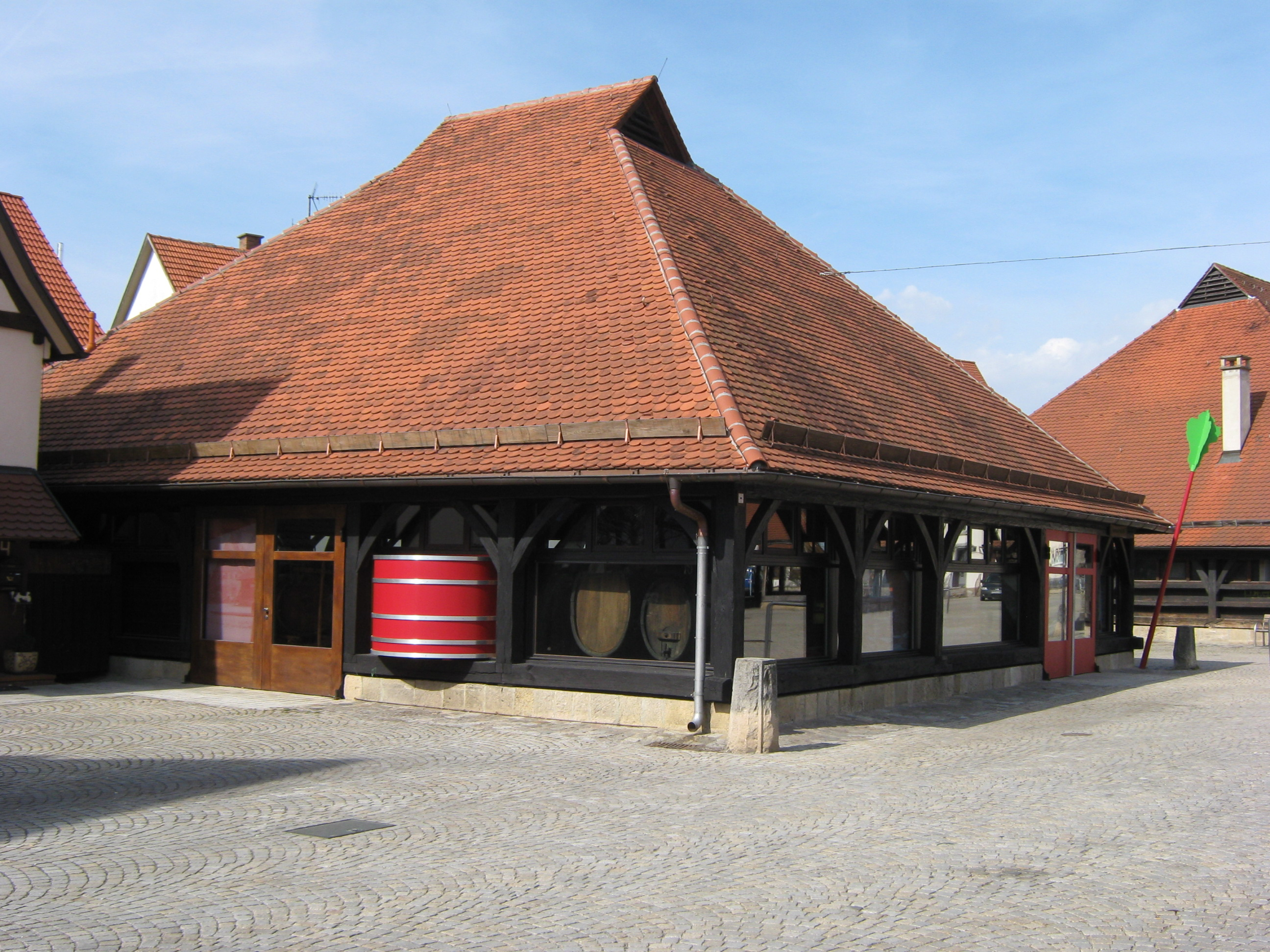 Die Herrschaftskelter gehört zum Ensemble der sieben Keltern auf dem Kelternplatz in Metzingen. Das Walmdach der Kelter, die 1655 erbaut wurde, hat eine Firstluke. Im Inneren befindet sich das Weinbaumuseum Metzingen mit dem originalen Kelterbaum von 1655. Am linken Bildrand abgeschnitten ist das ehemalige Zehnthäuschen des Kloster Zwiefalten. Rechts im Hintergrund die Äußere Stadtkelter.